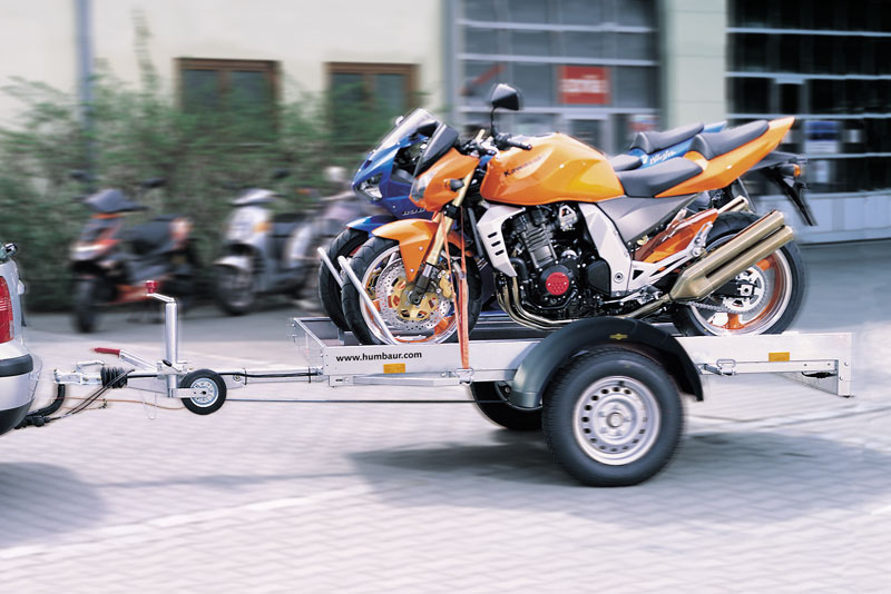 Humbaur Serie4000 Motorradtransporter HM